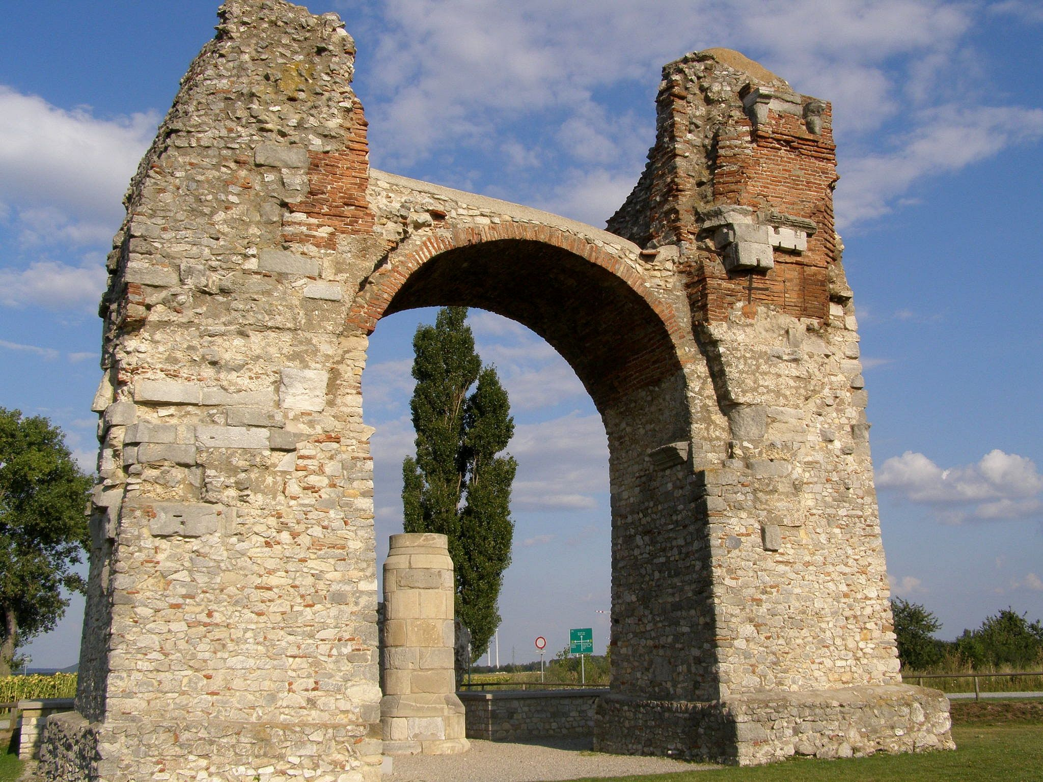 Celkový pohľad na bránu